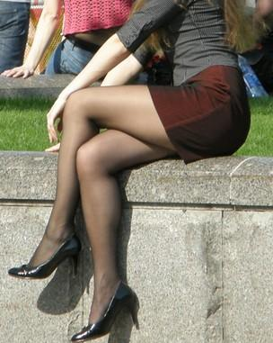 Collants noirs portés dans une tenue simple en journée